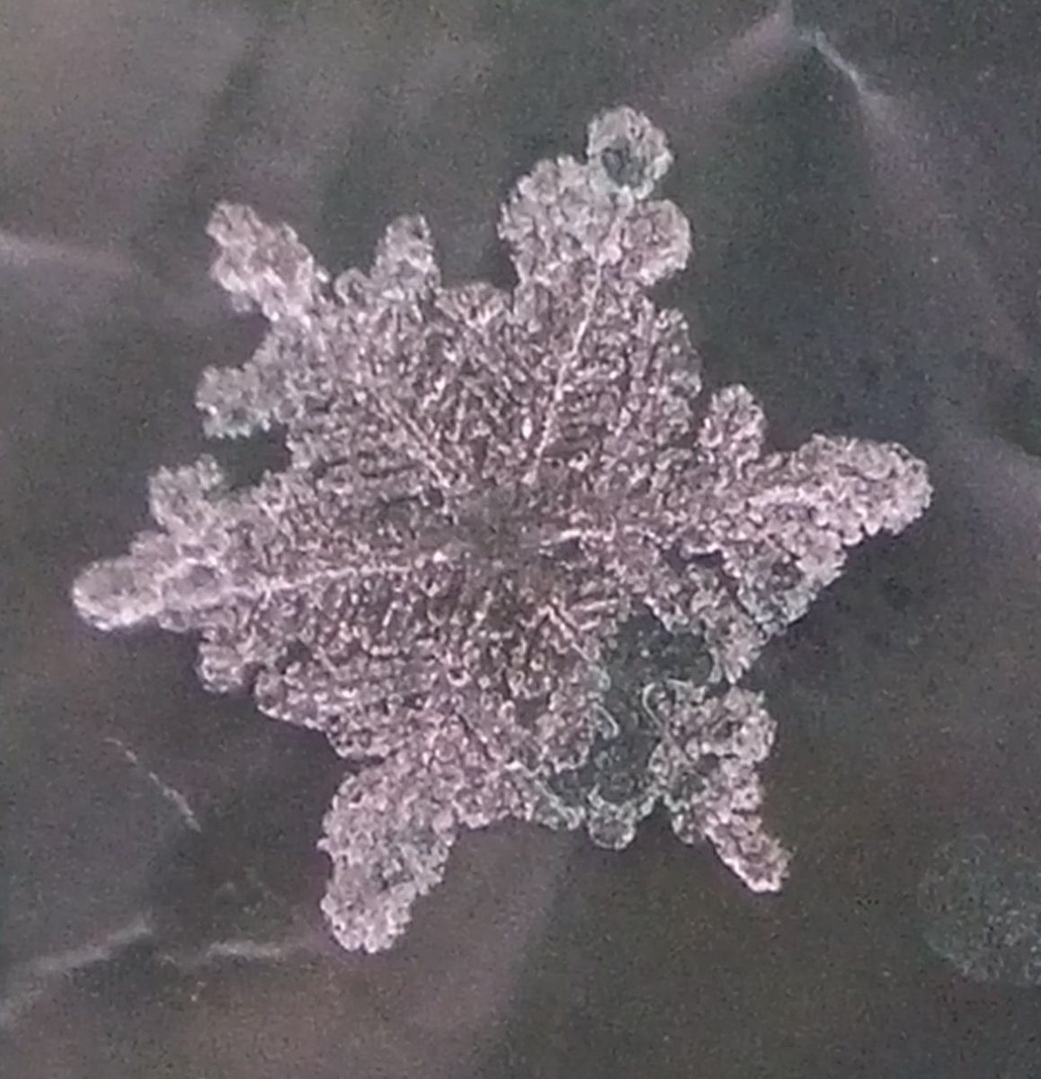 Schneeflocke wird zu Graupel